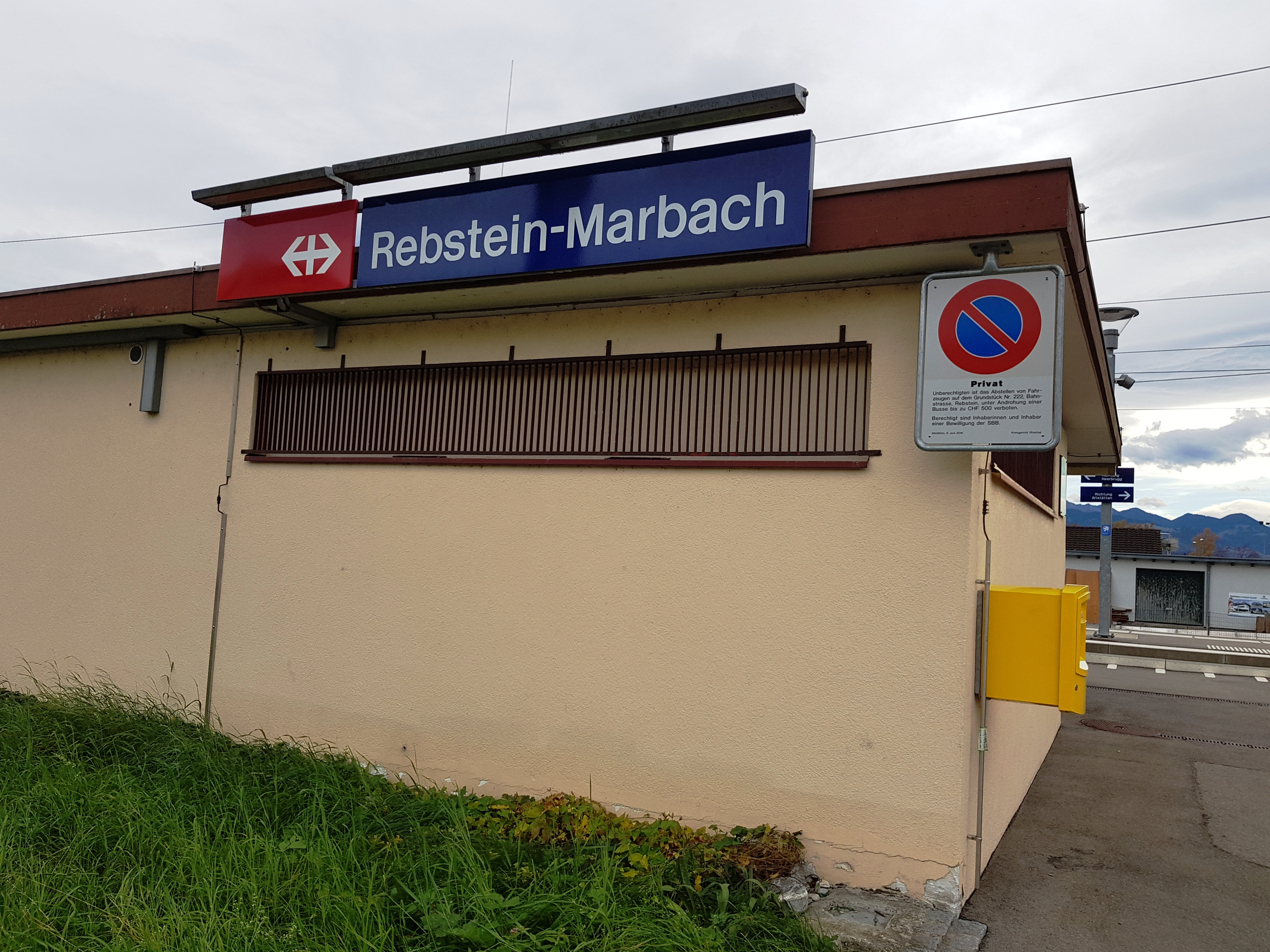 Es Näbedgeböi vom Bahof Räbschta-Marpa.